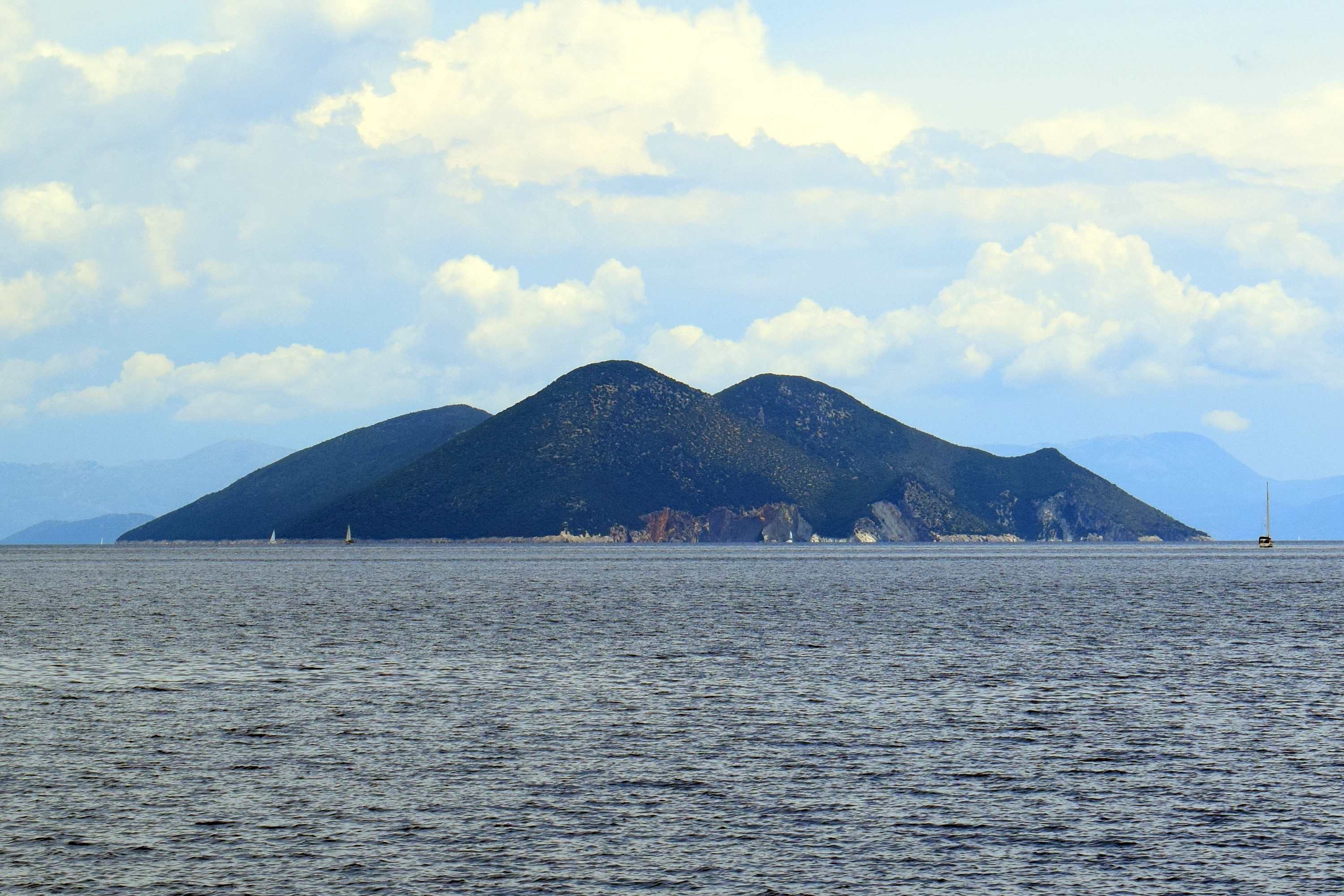 Die Insel Atokos von Westen, Ionische Inseln, Griechenland.